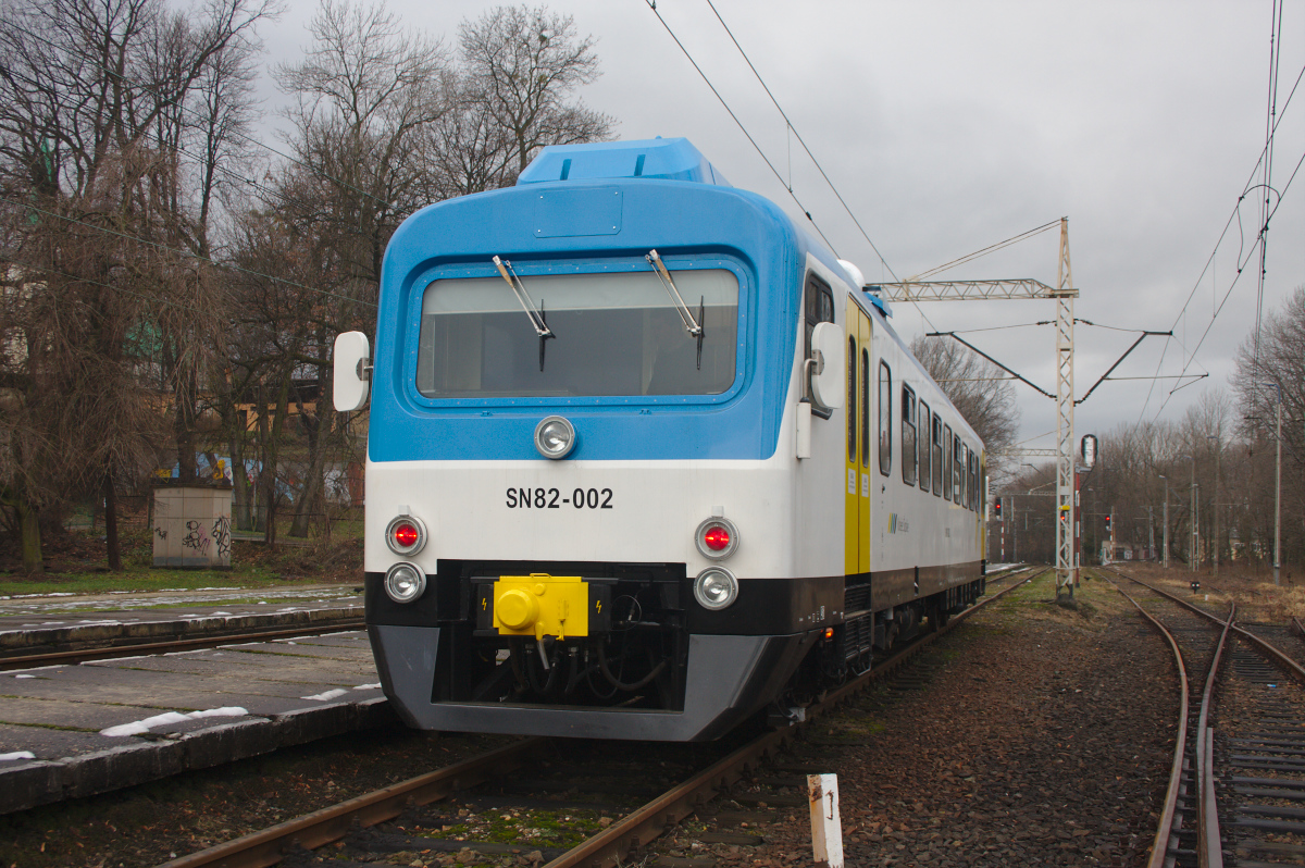 Pociąg KŚ44123 skończył bieg na stacji Cieszyn